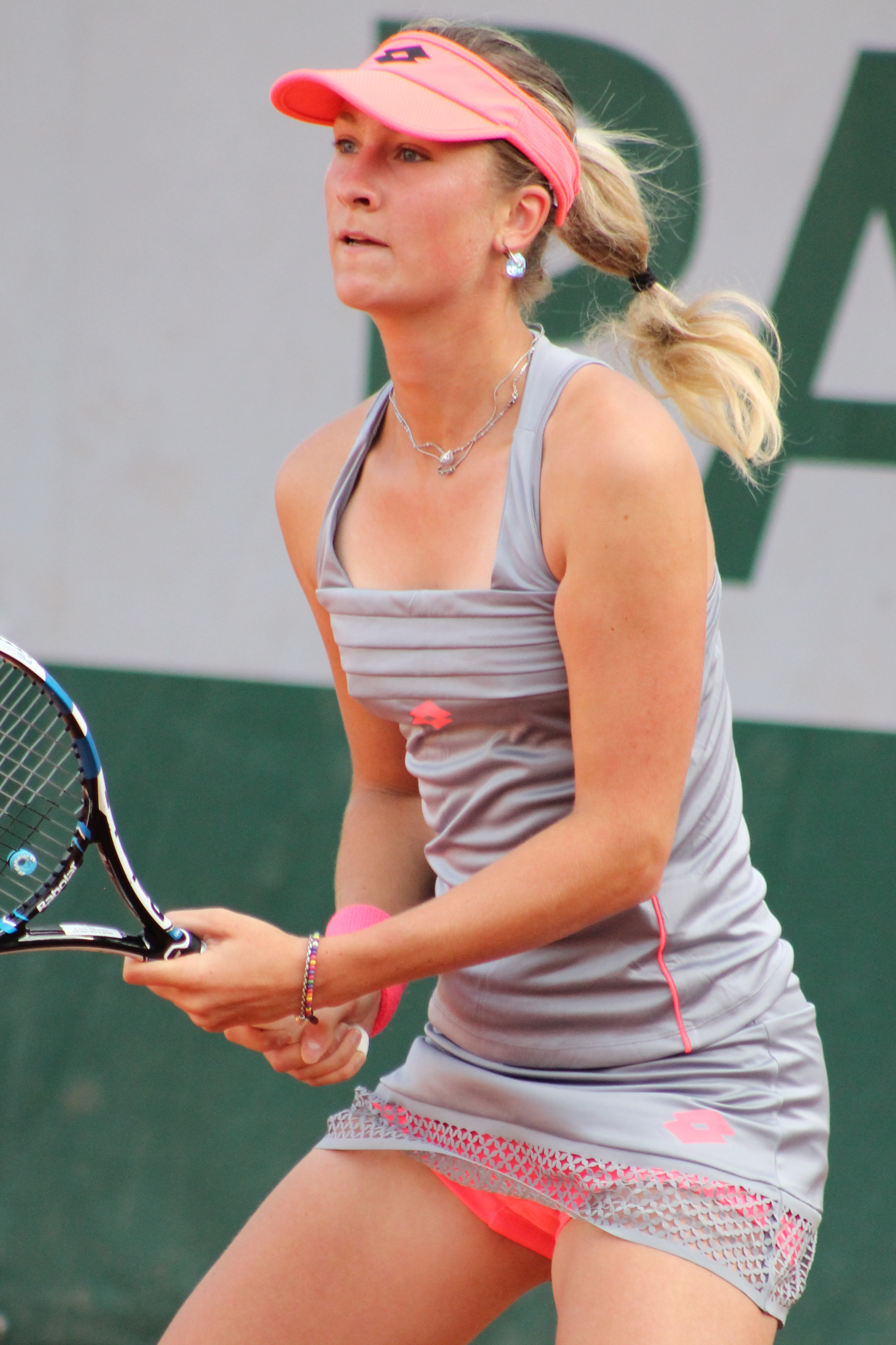 Allertova RG15 (7)